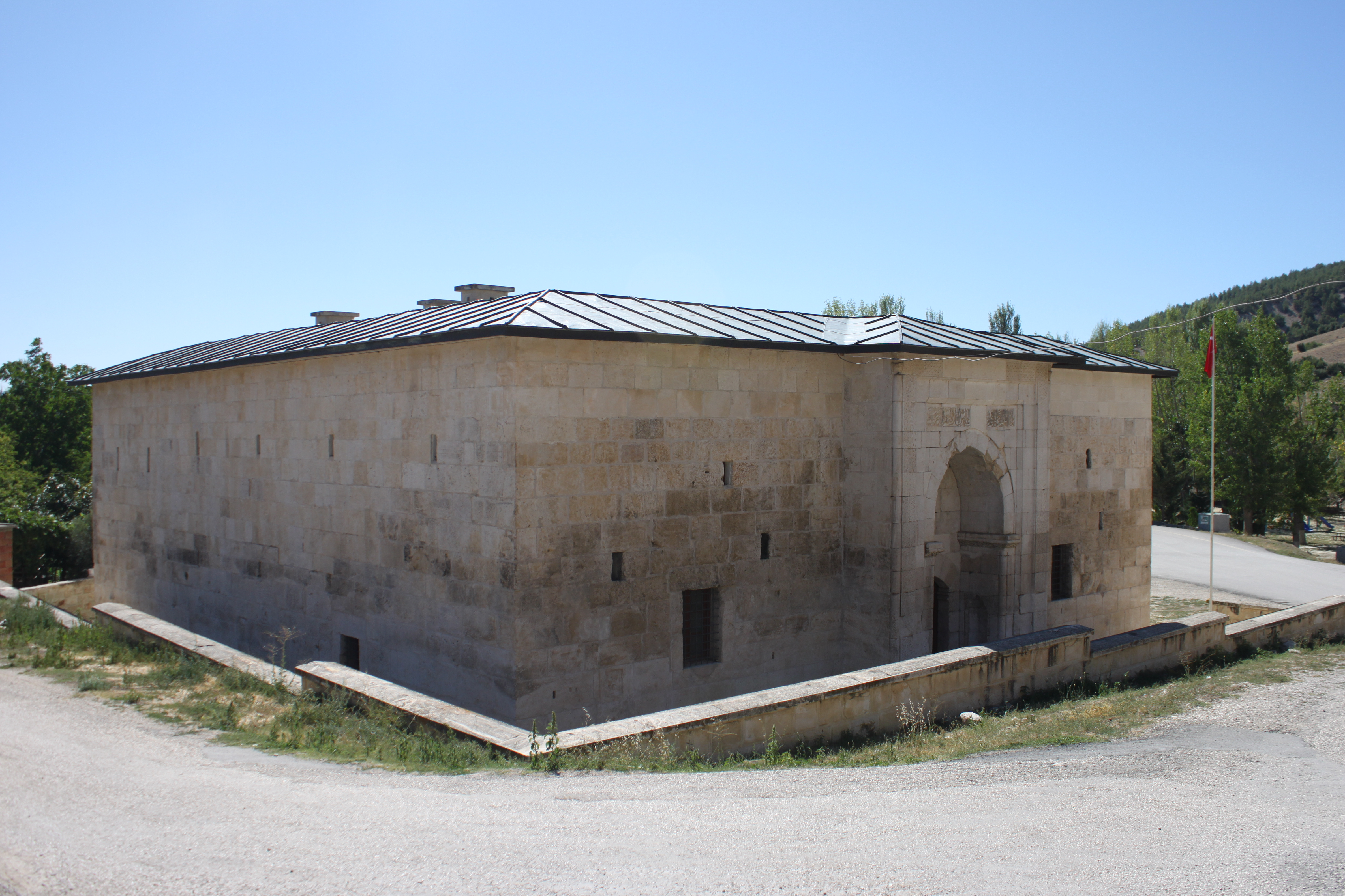 Die Koranschule in Korkuteli ist eines der ältesten Gebäude der Stadt.